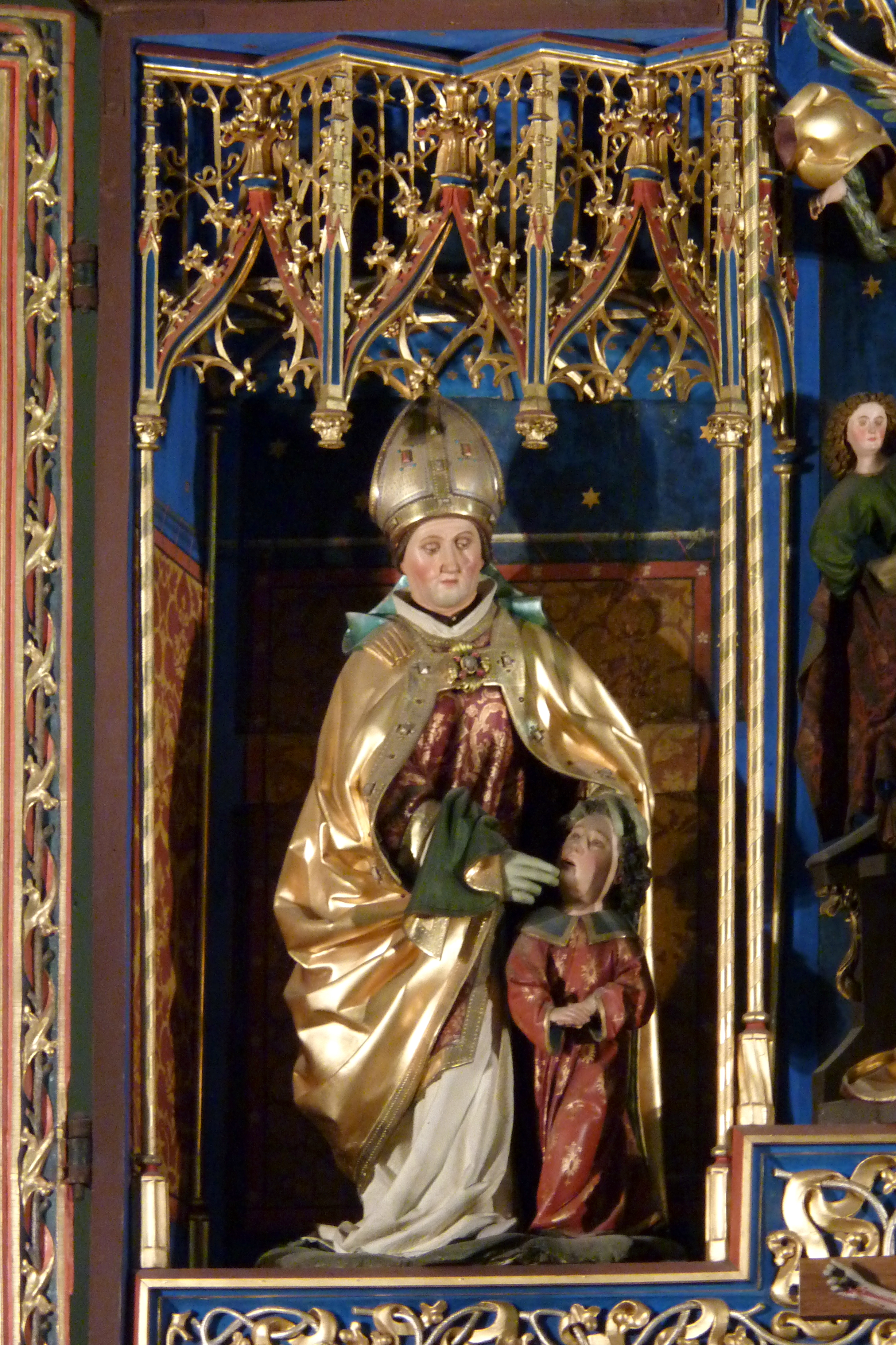 Evangelische Stadtkirche St. Blasius in Bopfingen, einer Stadt im Ostalbkreis (Baden-Württemberg), Flügelaltar von Friedrich Herlin, von 1472, linke Tafel des Schreines mit der Schnitzfigur des hl. Blasius von einem oberrheinischen Meister (in der Nachfolge von Niclas Gerhaert van Leyden)